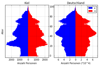 Altersstruktur (Bevölkerungspyramide) von Kiel zum Vergleich mit der Altersstruktur Deutschlands. Stand: 9. Mai 2011 Quelle der Ausgangsdaten: Zensusdatenbank Zensus 2011 der Statistischen Ämter des Bundes und der Länder ( aufgerufen 2018-03-06) Informationen aus dieser Datenbank dürfen mit Quellenangabe weitergegeben, vervielfältigt und verbreitet werden.